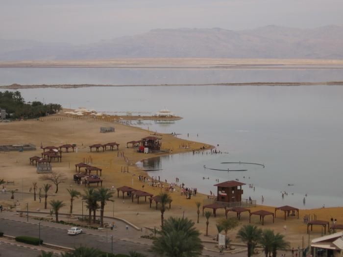 חוף ים המלח